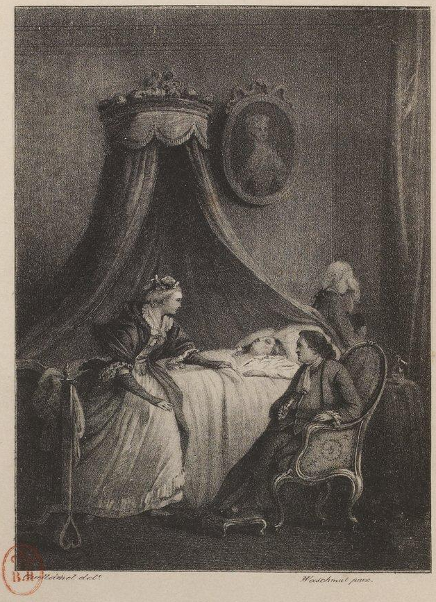 Xavier Forneret - L'homme noir, acte V